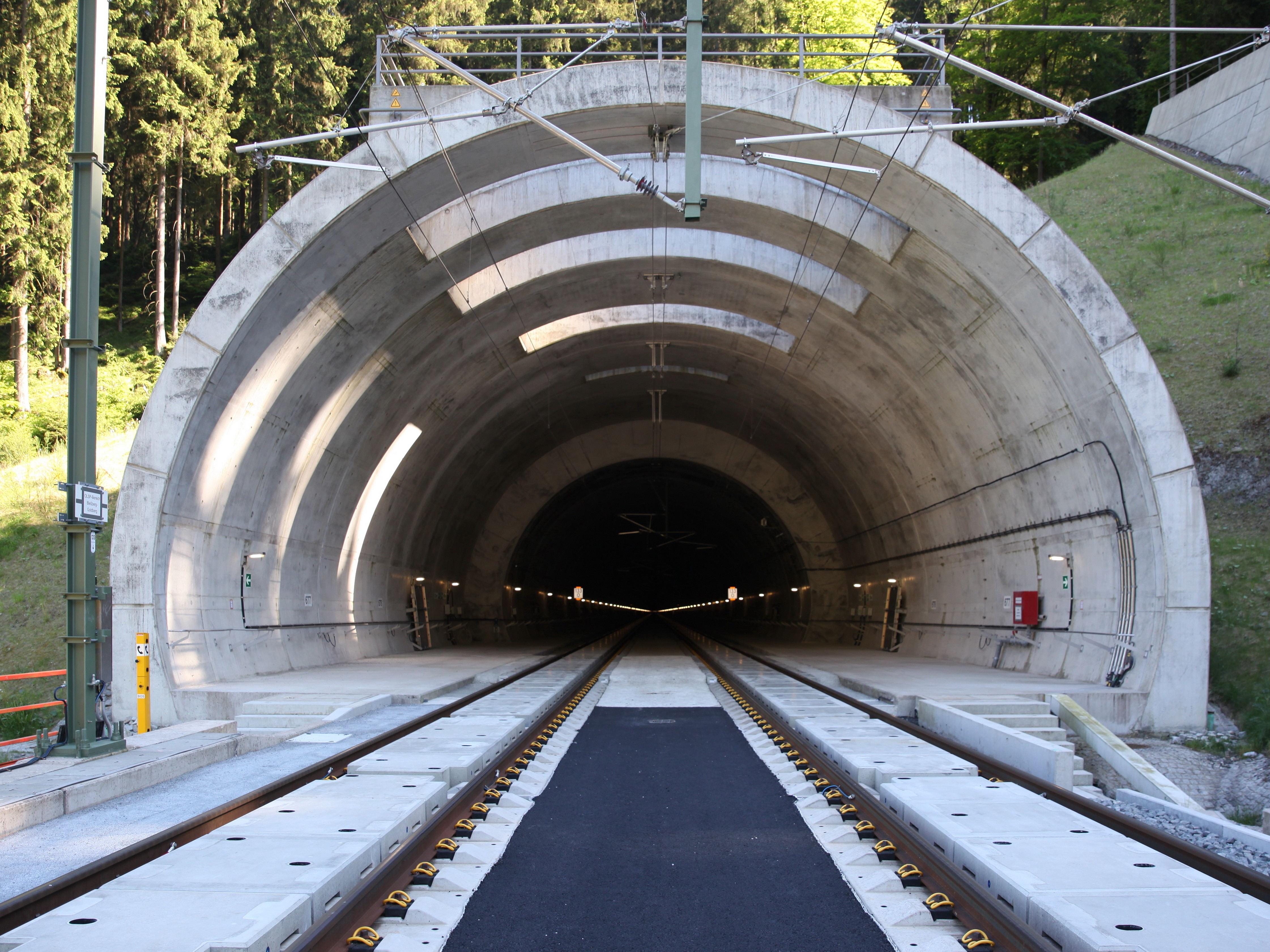 Tunnel Bleßberg, Nordportal